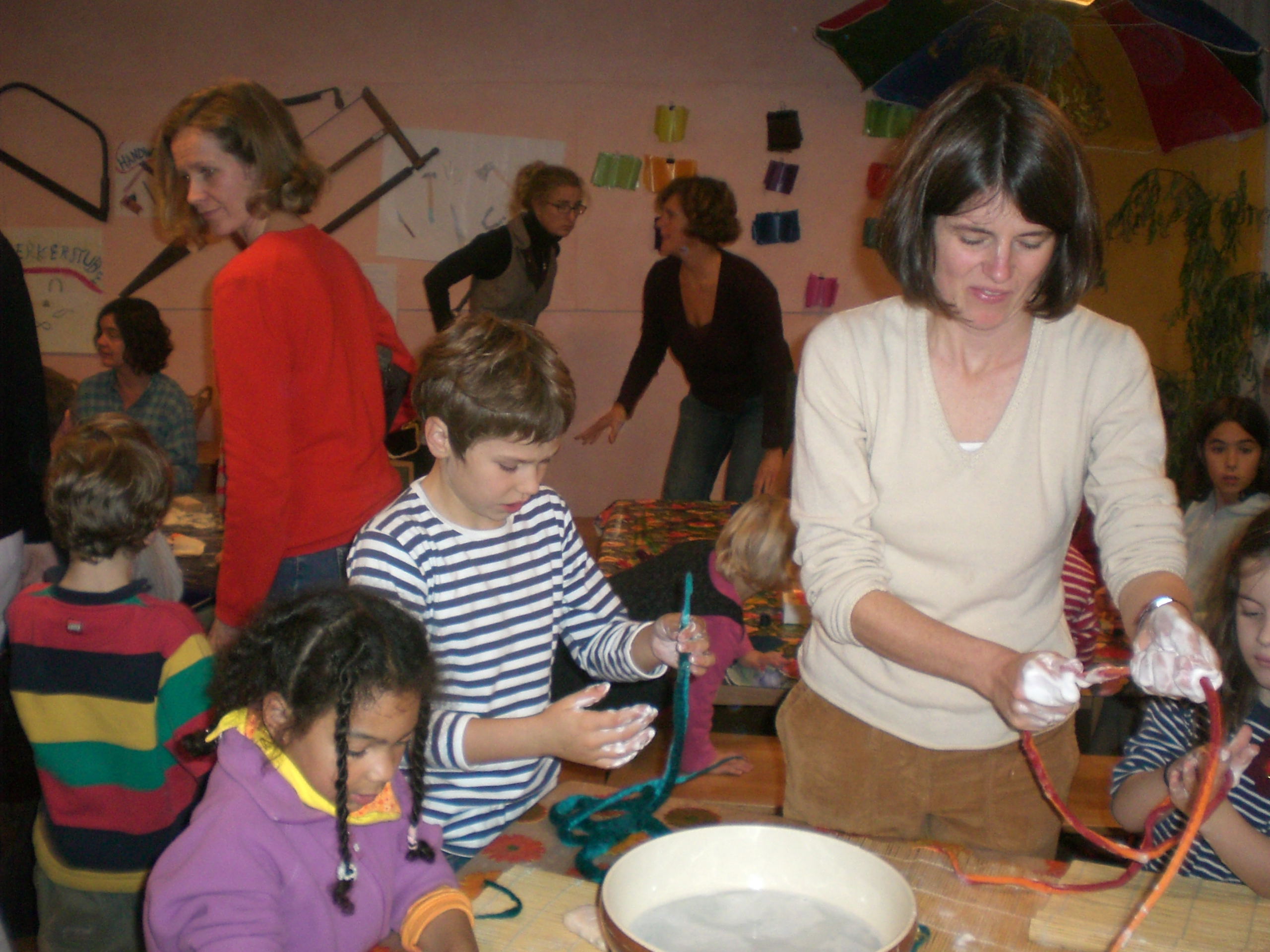 Lernejanoj kun gepatroj manlaboras en la valdorfa lernejo de Darmstadt (Germanio) Fonto: propra foto